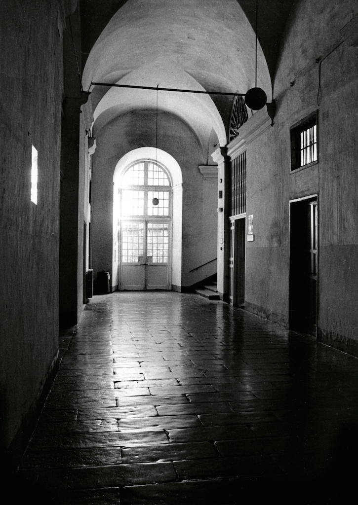 Genova, interno dell'Albergo dei Poveri Campagna fotografica eseguita nel 1993